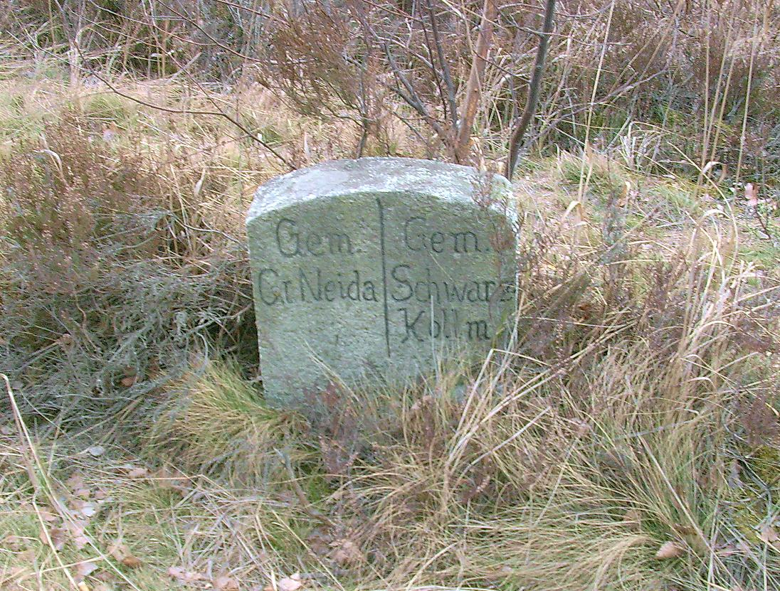 Gemarkungsstein von Groß Neida und Schwarzkollm, Ortsteil von Hoyerswerda